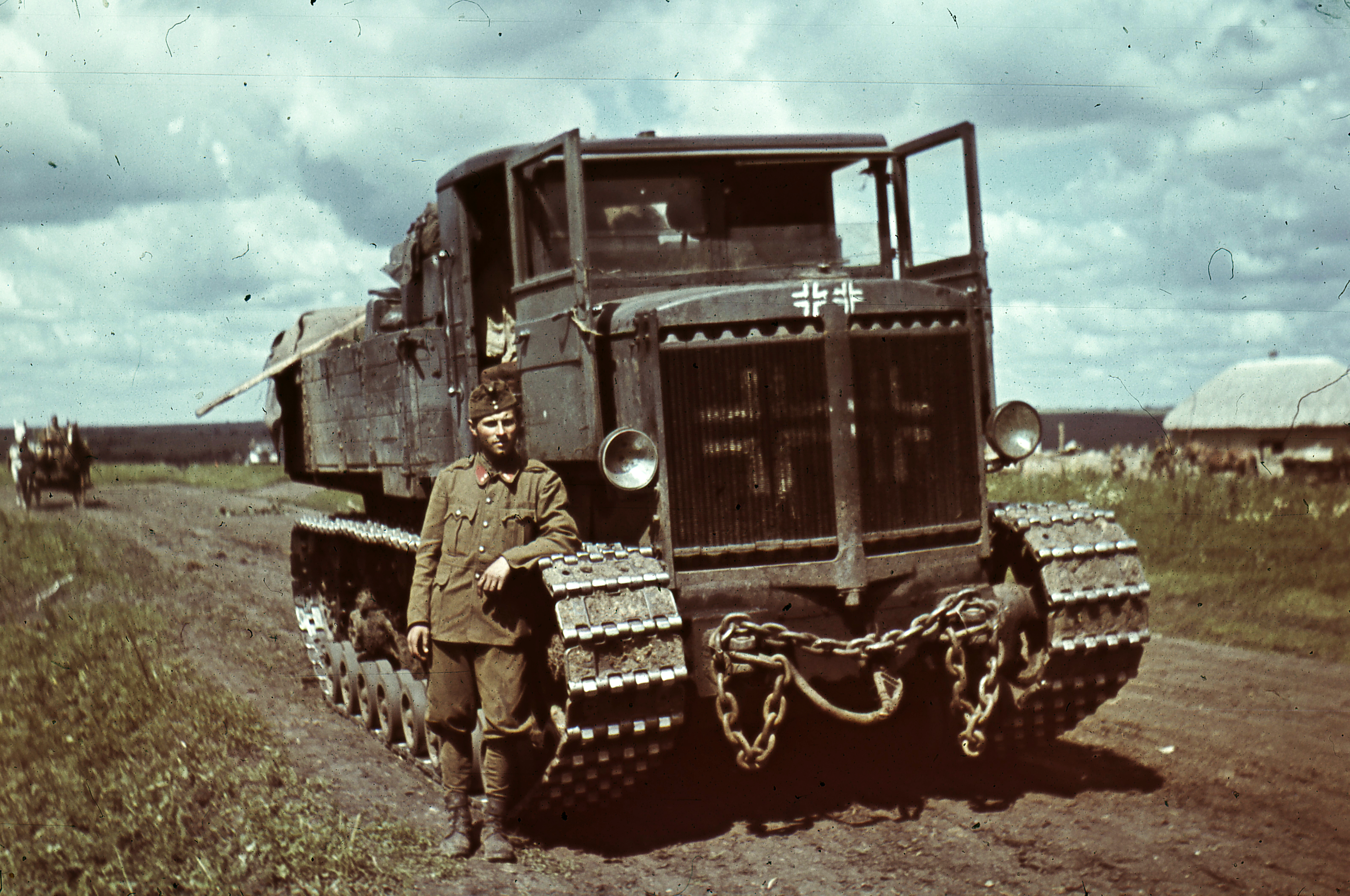 Zsákmányolt szovjet gyártmányú Vorosilovec vontató. Tags: track, tow truck, colorful, Soviet brand, Voroshilovets-brand, second World War Title: Zsákmányolt szovjet gyártmányú Vorosilovec vontató.